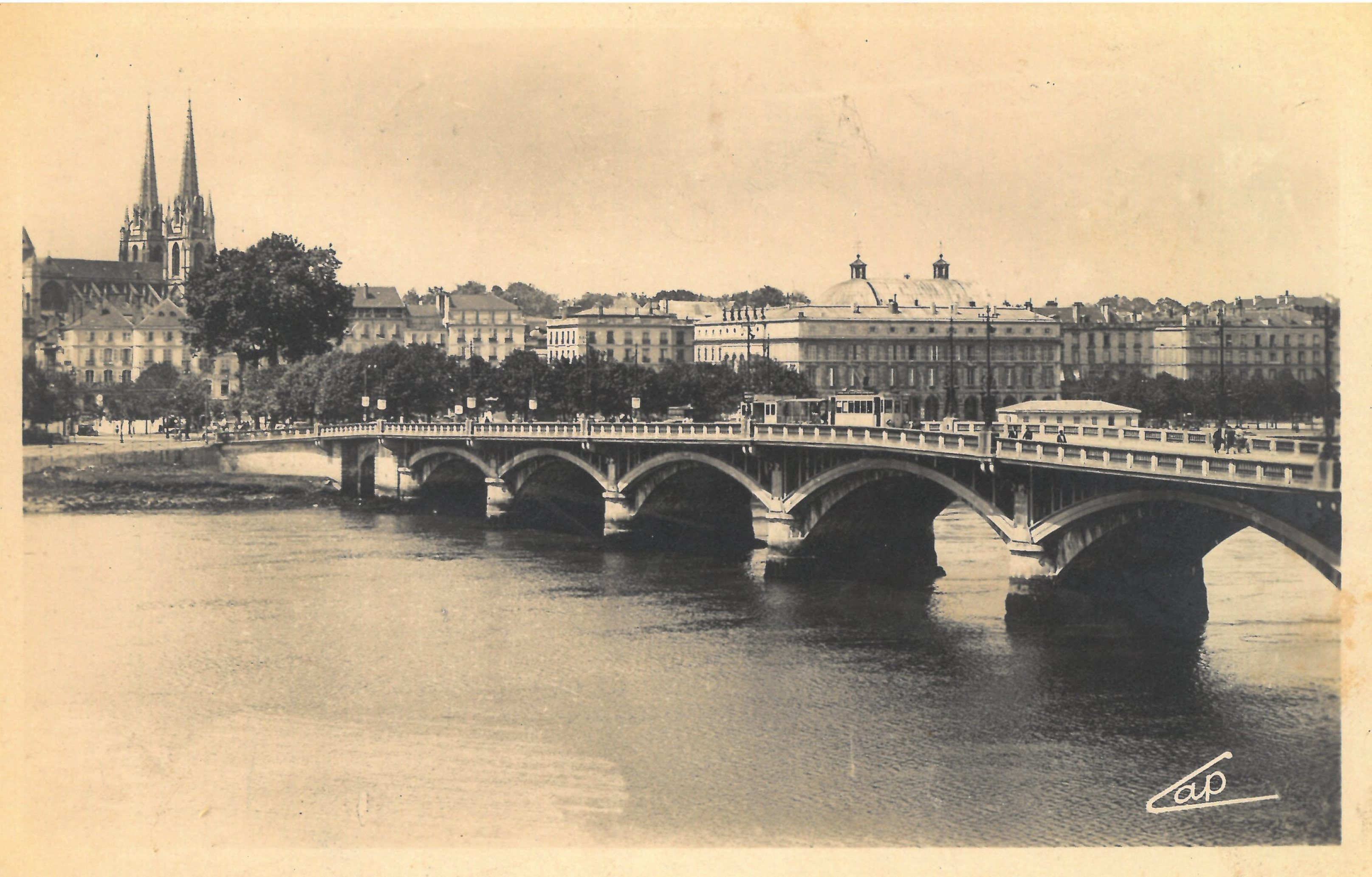 Bayonne : Vue sur le Pont Saint-Esprit et l'Hôtel de ville. Carte postale envoyée le 5 mai 1945. Real-Photo CAP, Paris.